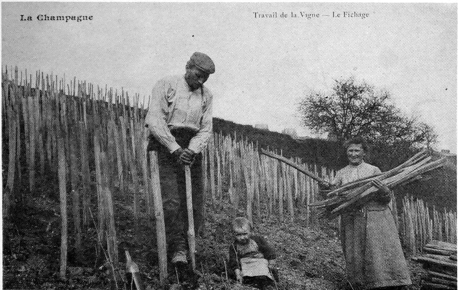 sur une vue ancienne.